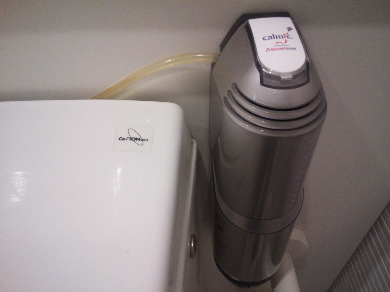 新型サニタイザー